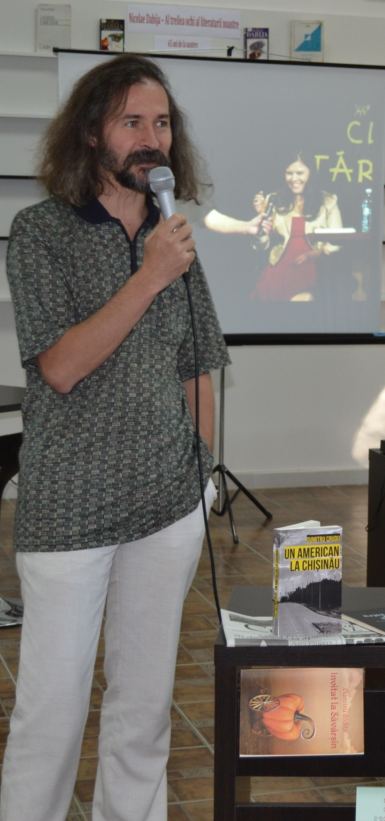 Emilian Galaicu-Păun - considerații asupra romanului „Un american la Chișinău”